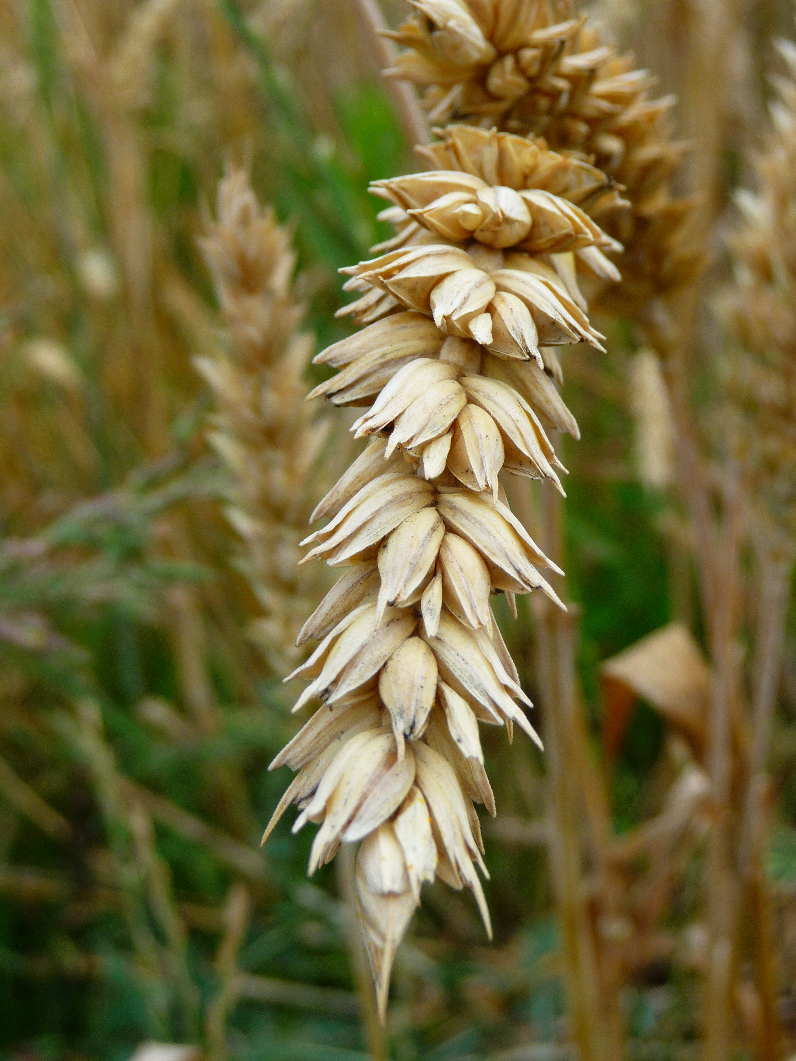 Detailansicht einer Weizenähre (Triticum L.)